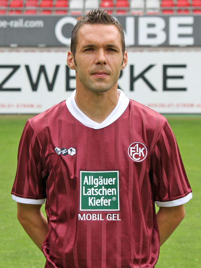 Christian Tiffert, Fußballspieler